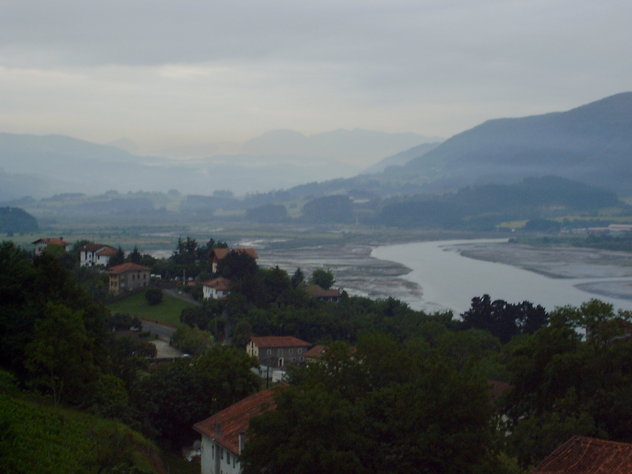 Urdaibai landscape